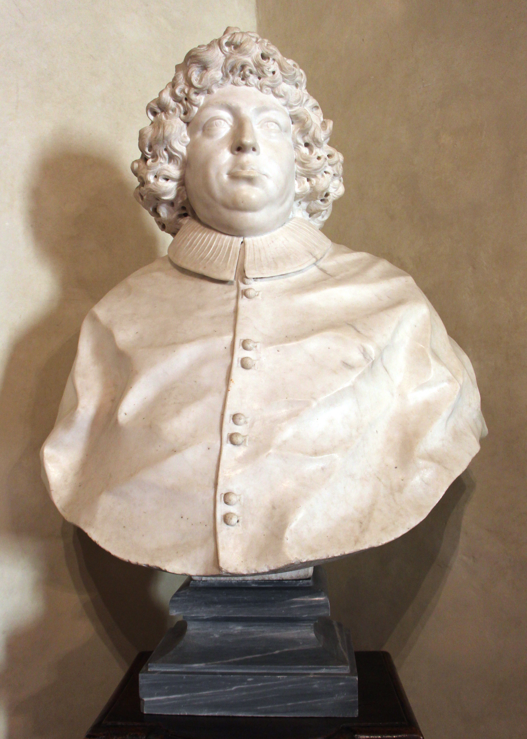 Villa medicea di Cerreto Guidi - MIBAC The making of this document was supported by Wikimedia CH. (Submit your project!) For all the files concerned, please see the category Supported by Wikimedia CH. This is a photo of a monument which is part of cultural heritage of Italy.